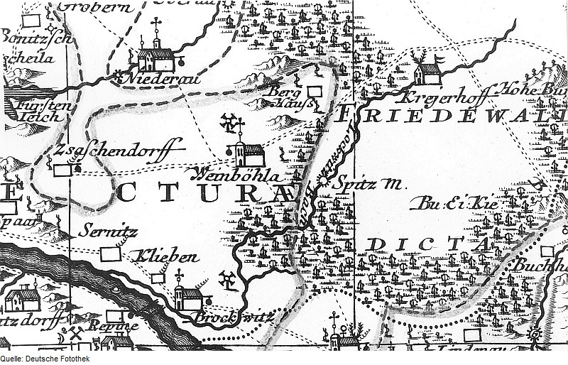 Original image description from the Deutsche Fotothek Weinböhla. Seutter, Kirchenkreis Dresden, Mitte 18. Jh. (Sign.: VII 43)